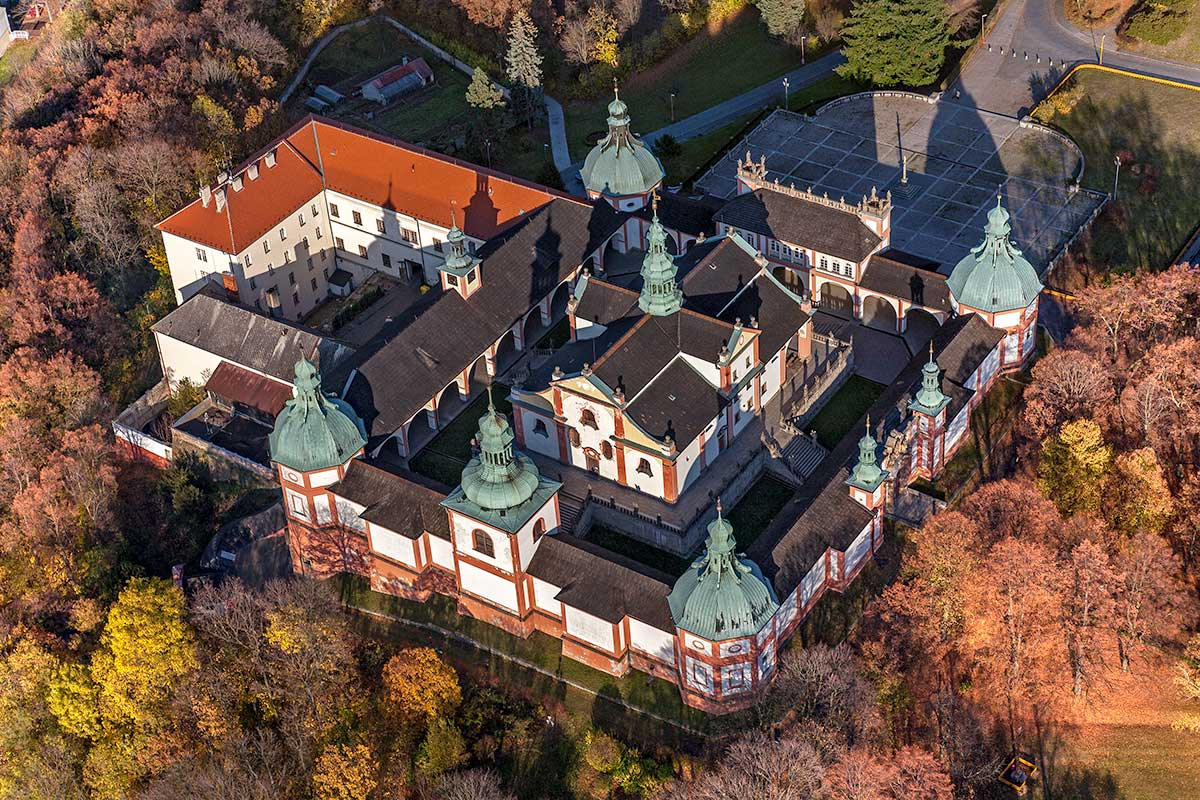 Poutní místo Svatá Hora, Příbram II čp. 590, 591, 592, Příbram.